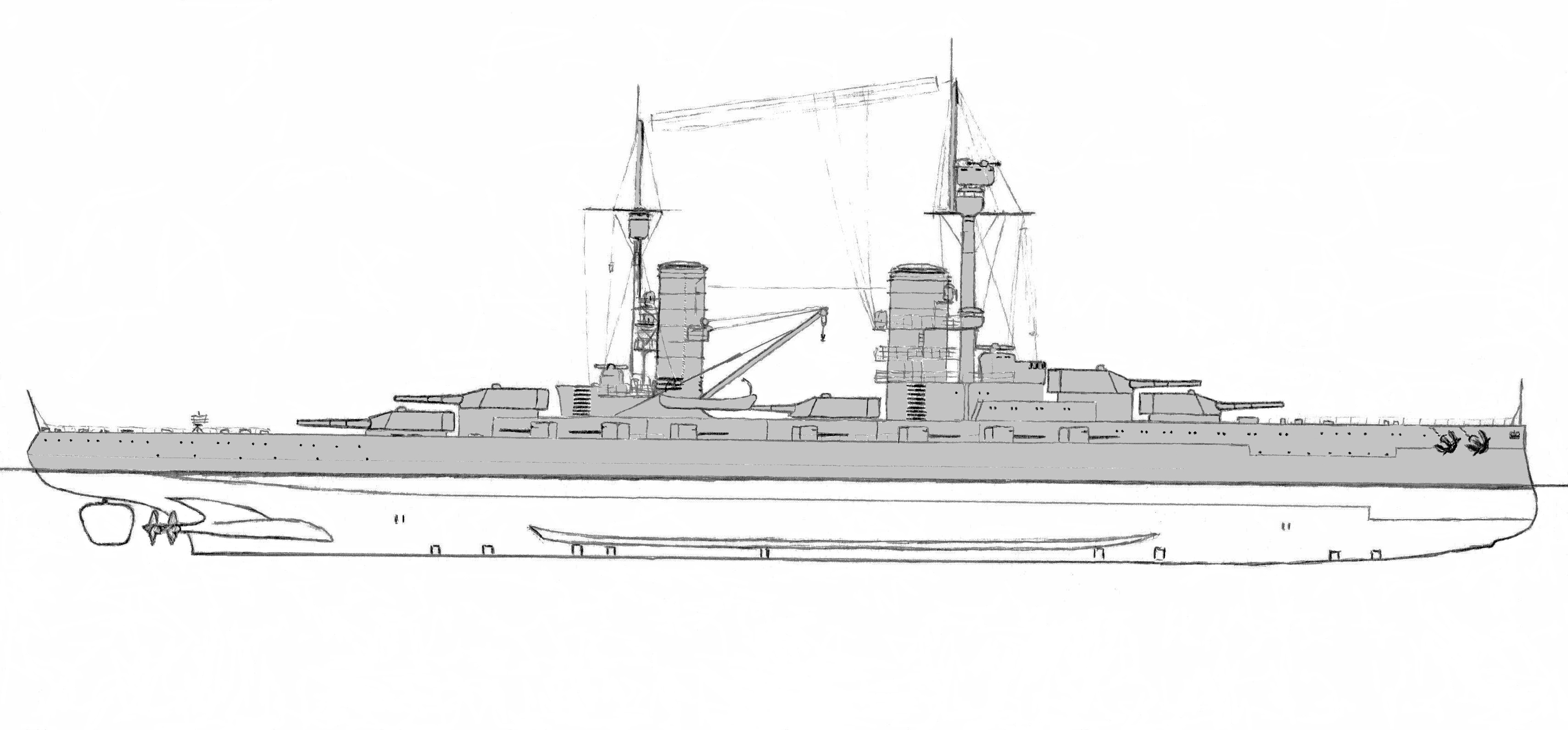 Германский линейный корабль "Гроссер Курфюрст", тип "Кениг"